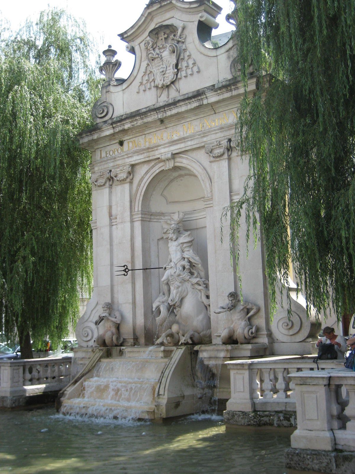 Kapitelschwemme (Pferdeschwemme), Salzburg, Österreich